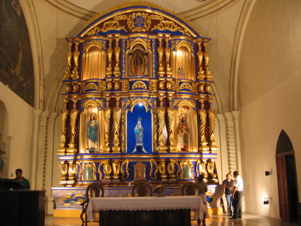 Santuario de Nuestra Señora de Guadalupe